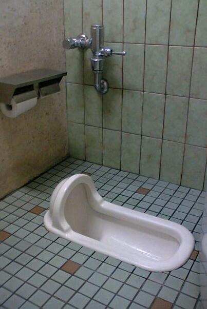 TOTO C75+TV750